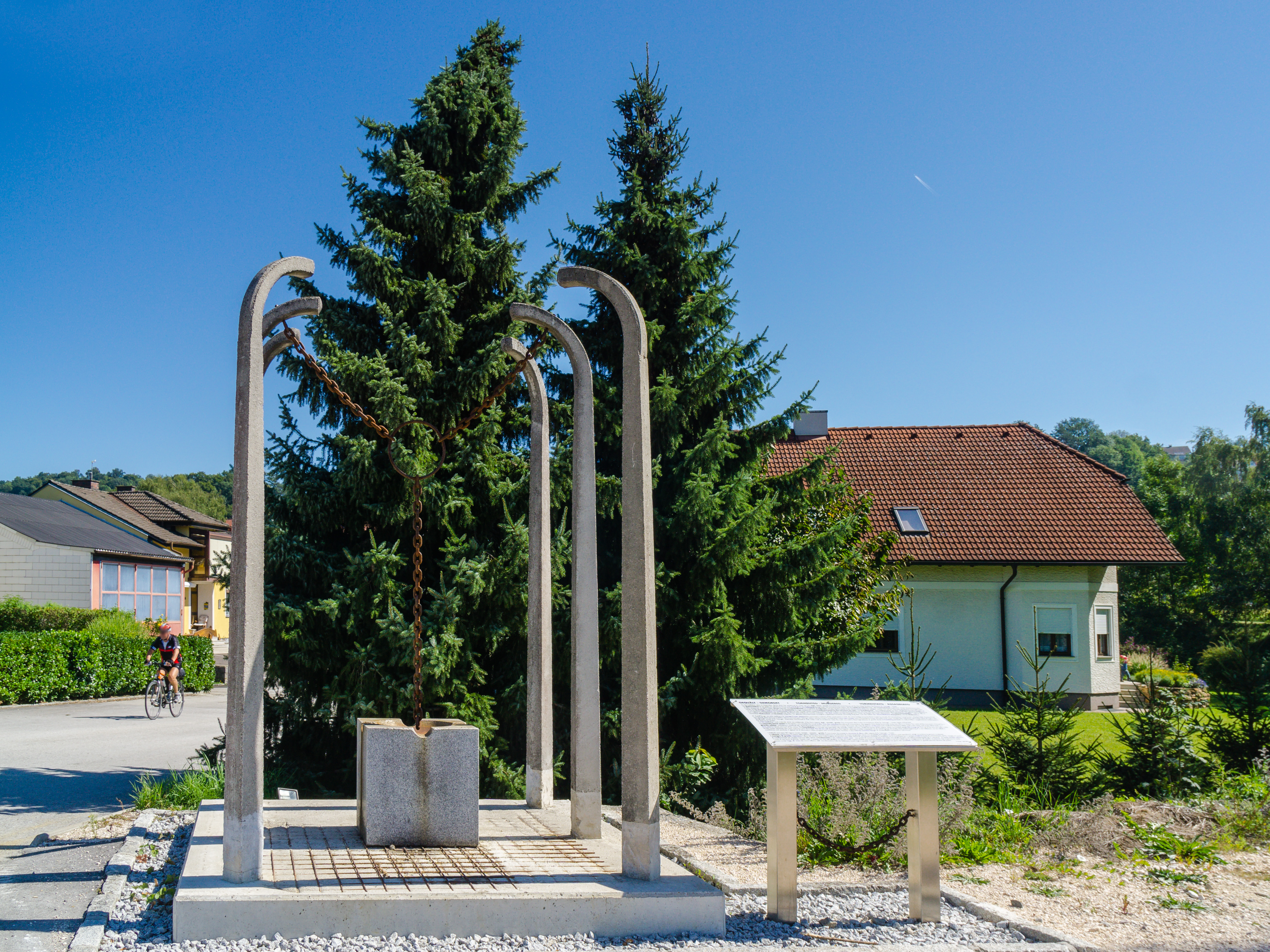 Mahnmal zum KZ Gusen (Außenlager des KZ Mauthausen) des Künstler Rudolf Burger aus Gusen, Wimminger Straße in Sankt Georgen an der Gusen